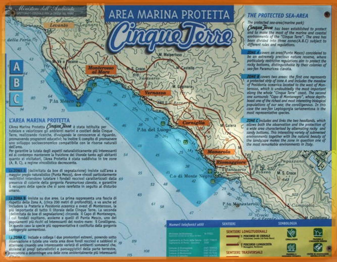 Immagine dalle Cinque Terre